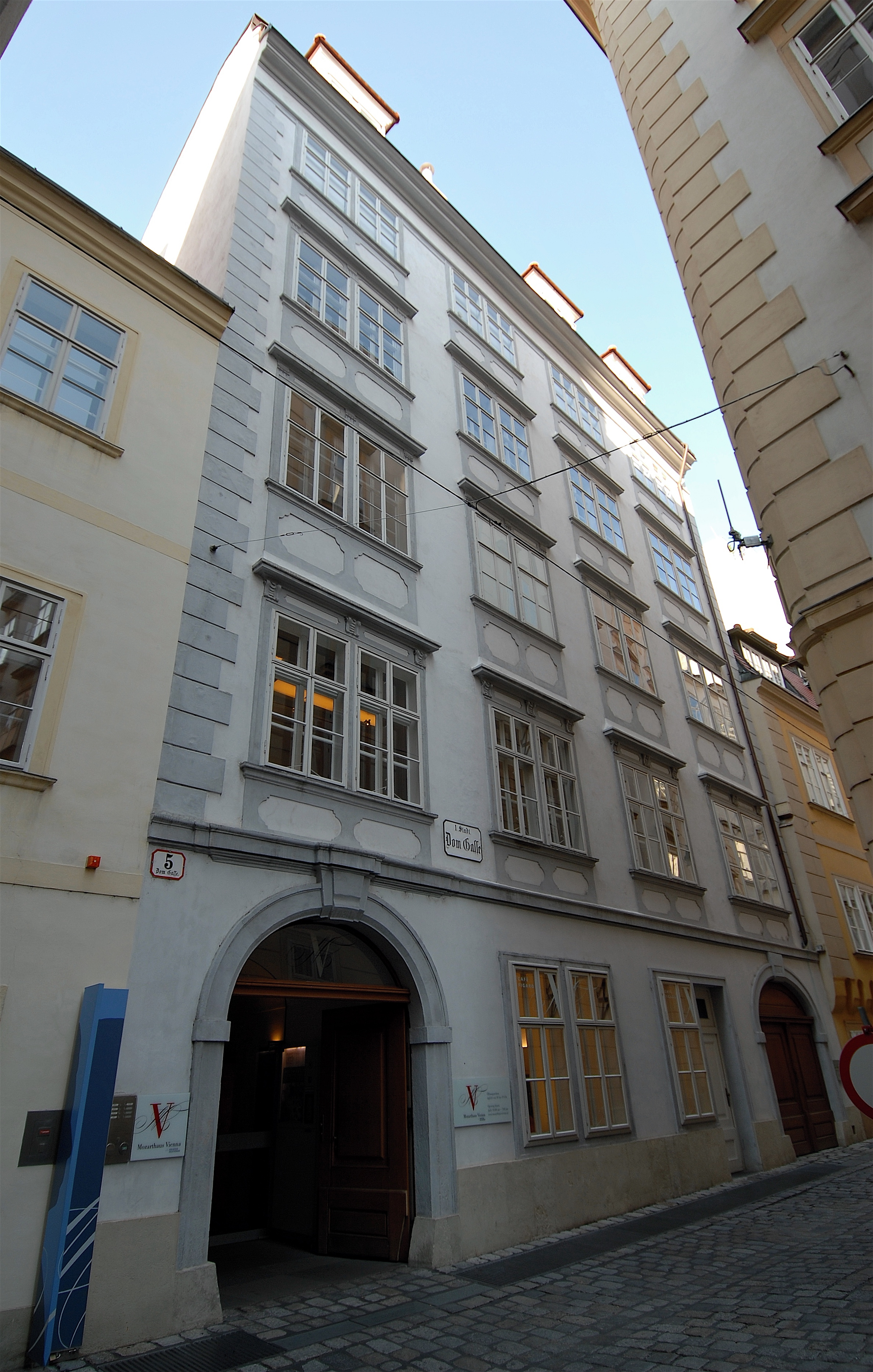 Mozarthaus, Wien, Domgasse, 2012